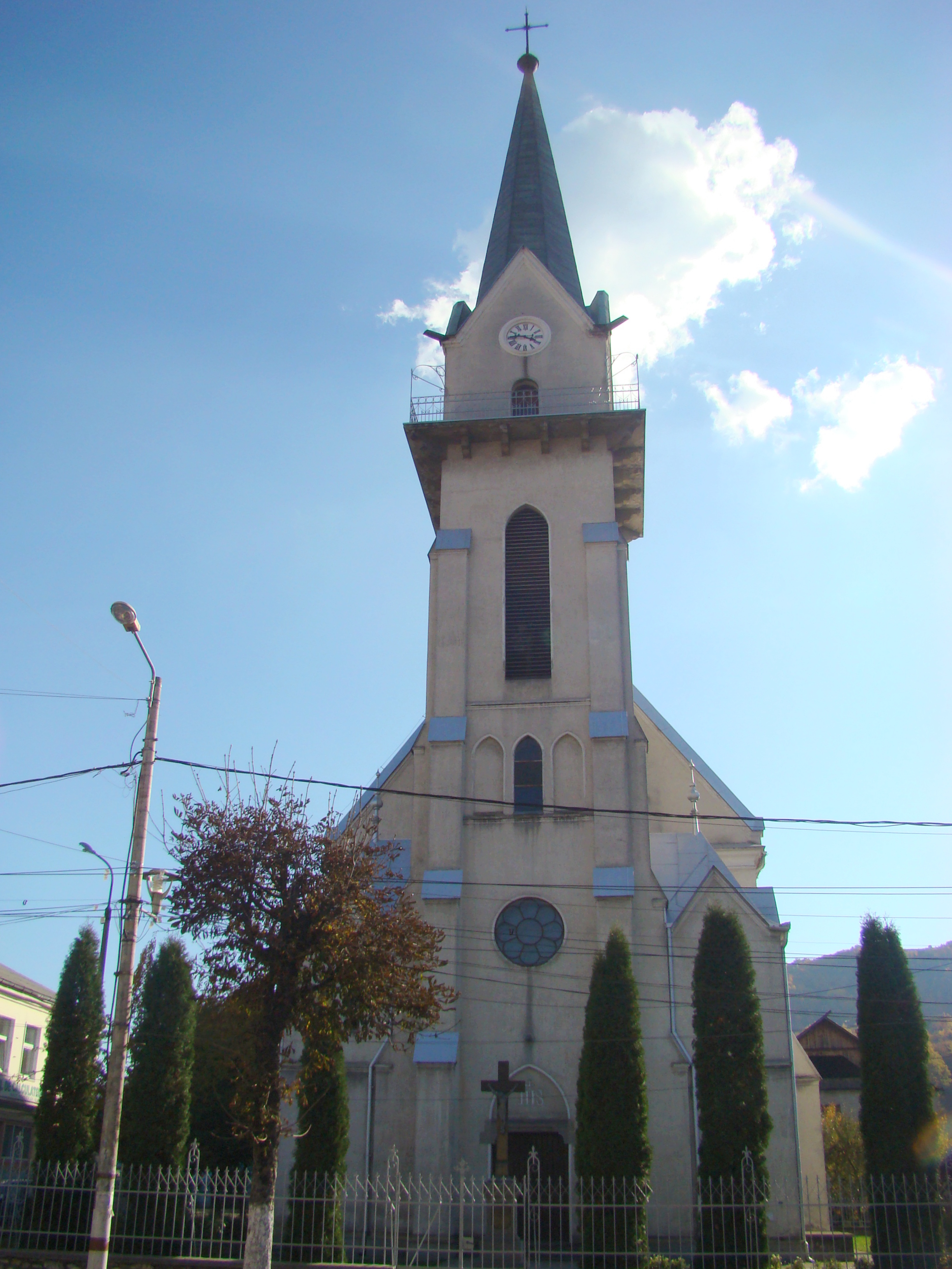 Biserica romano-catolică "Ioan și Ana", oraș Vișeu de Sus